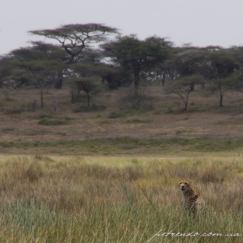 Meatu, Tanzania